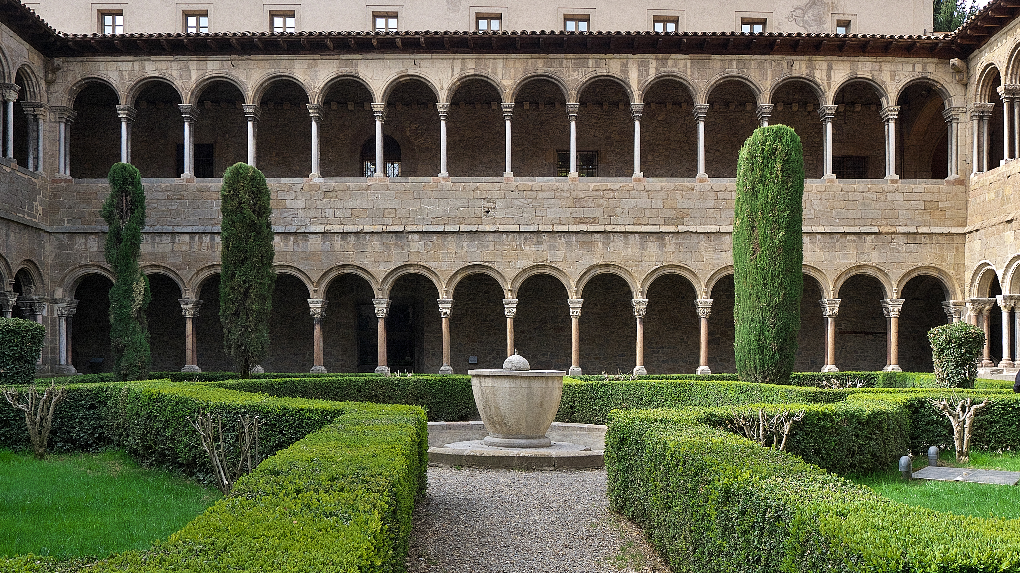 Los orígenes son del siglo XII. A finales del XIV se comienza la planta superior.